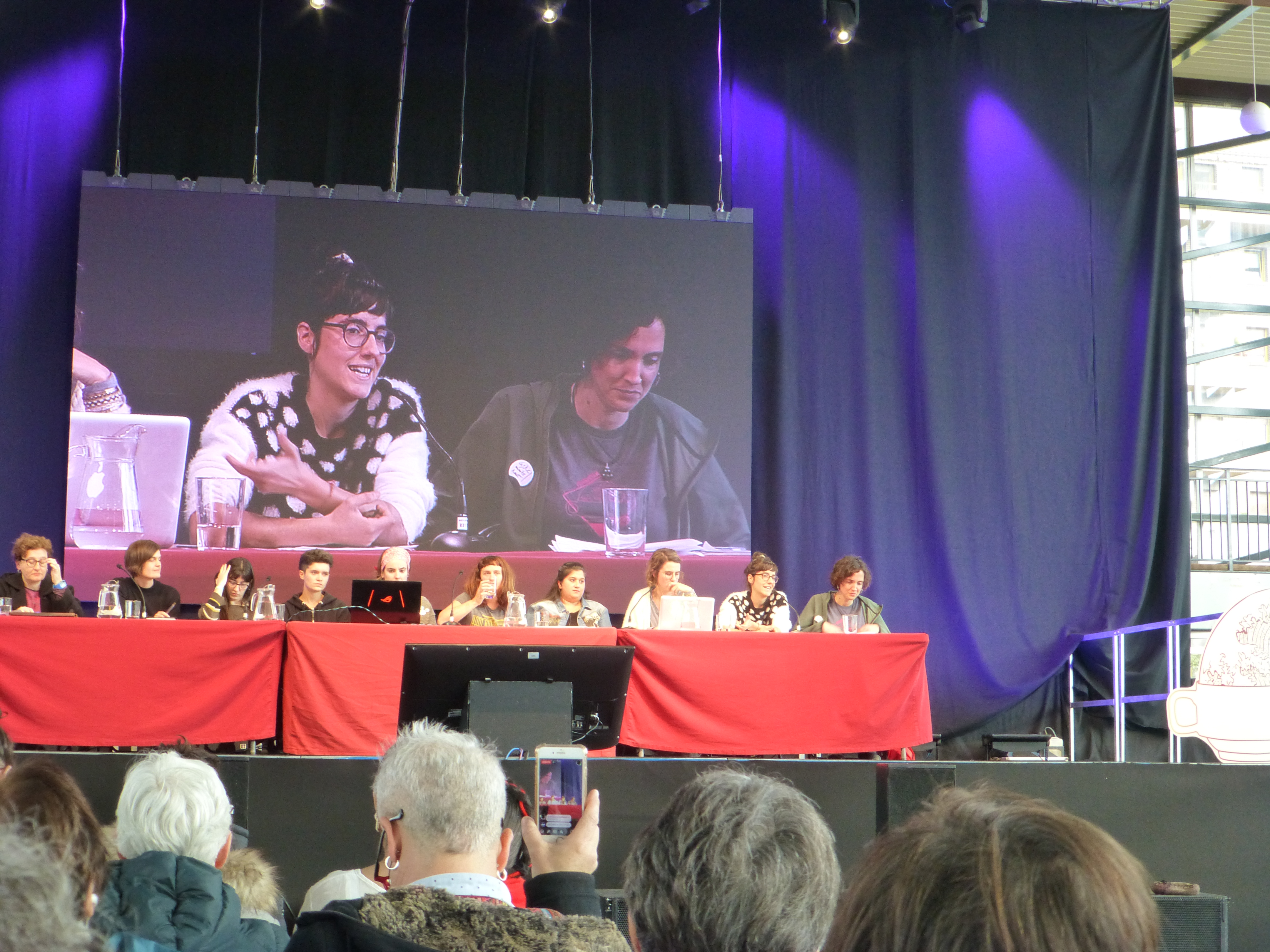 Amaia Zufia, EHko BIlguneko kidea, azaroaren 3ko mahai-inguru zentrala: Mugimendu feministaren erraiak.